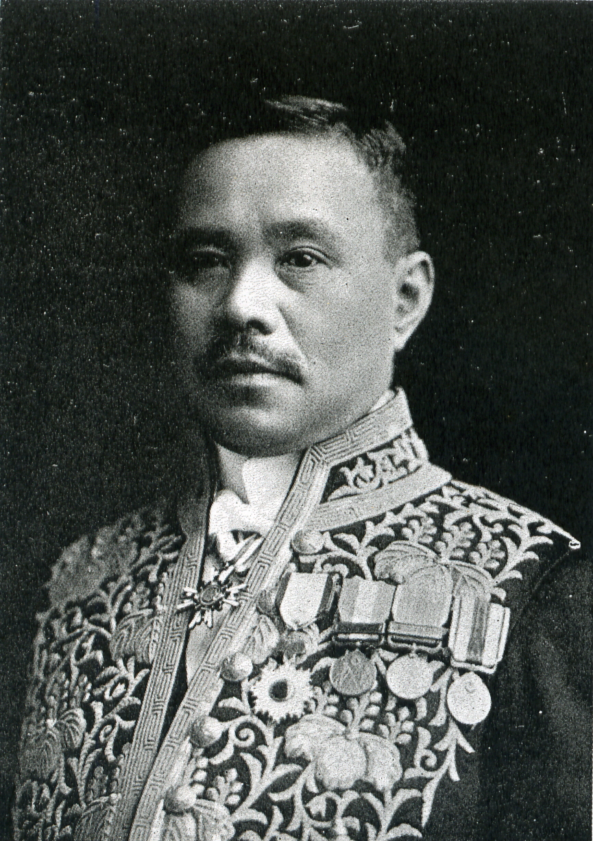 この写真は、八田宗吉（1874-1938）の写真です。